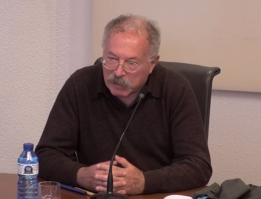 Levi Giovanni Podcasts de la Casa de Velázquez